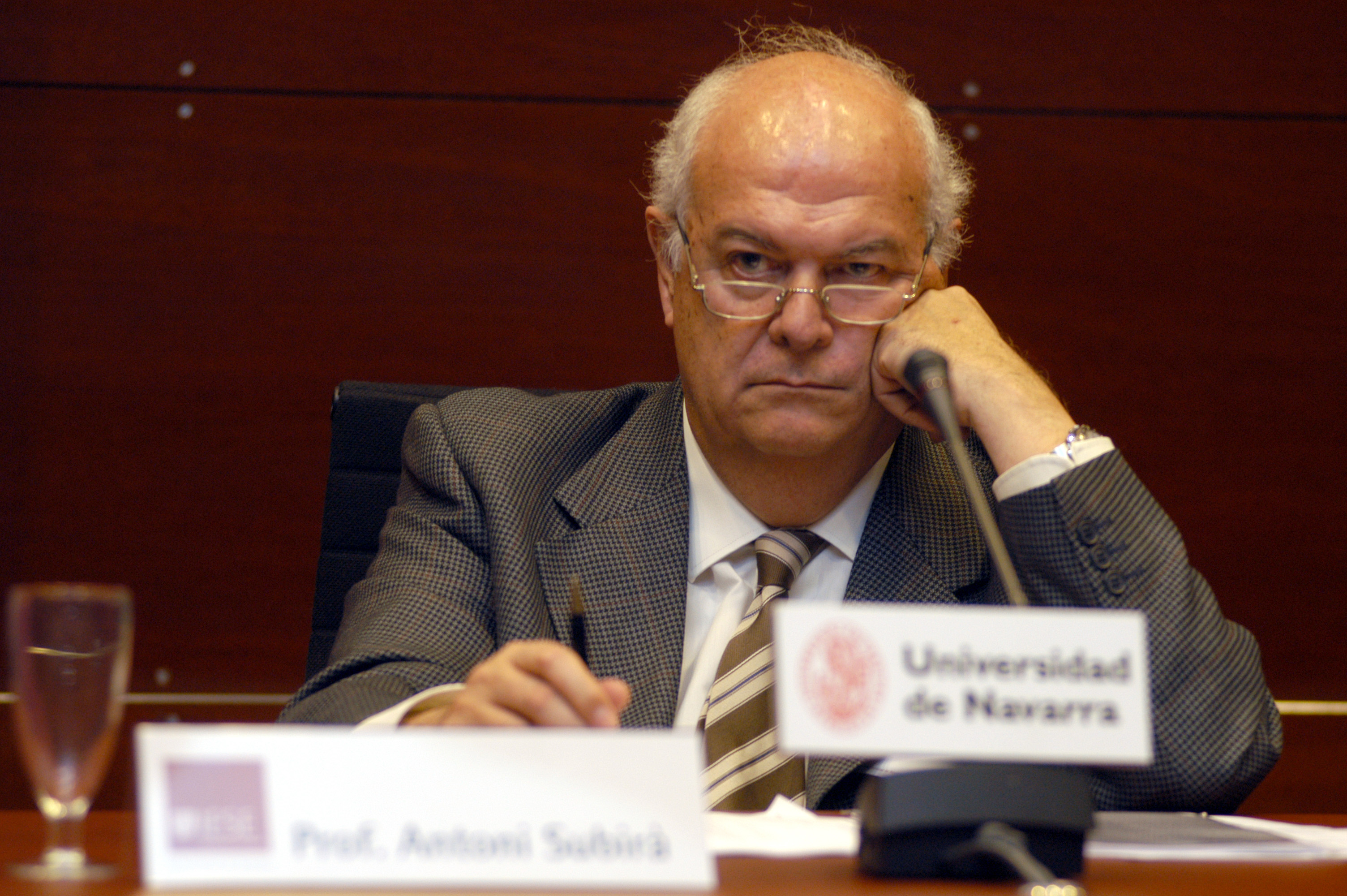 politico español